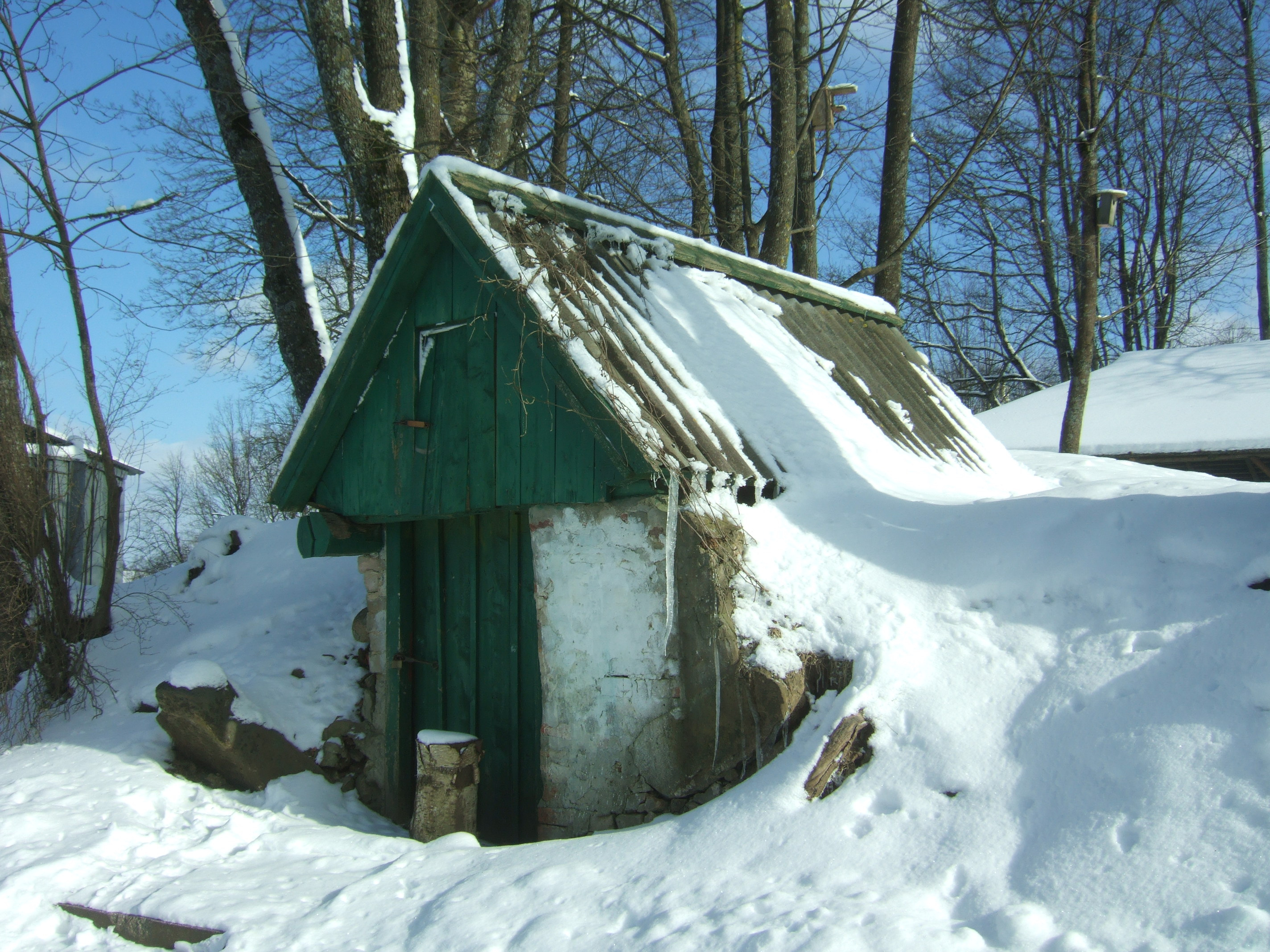 Sudervės dvaro sodybos rūsys